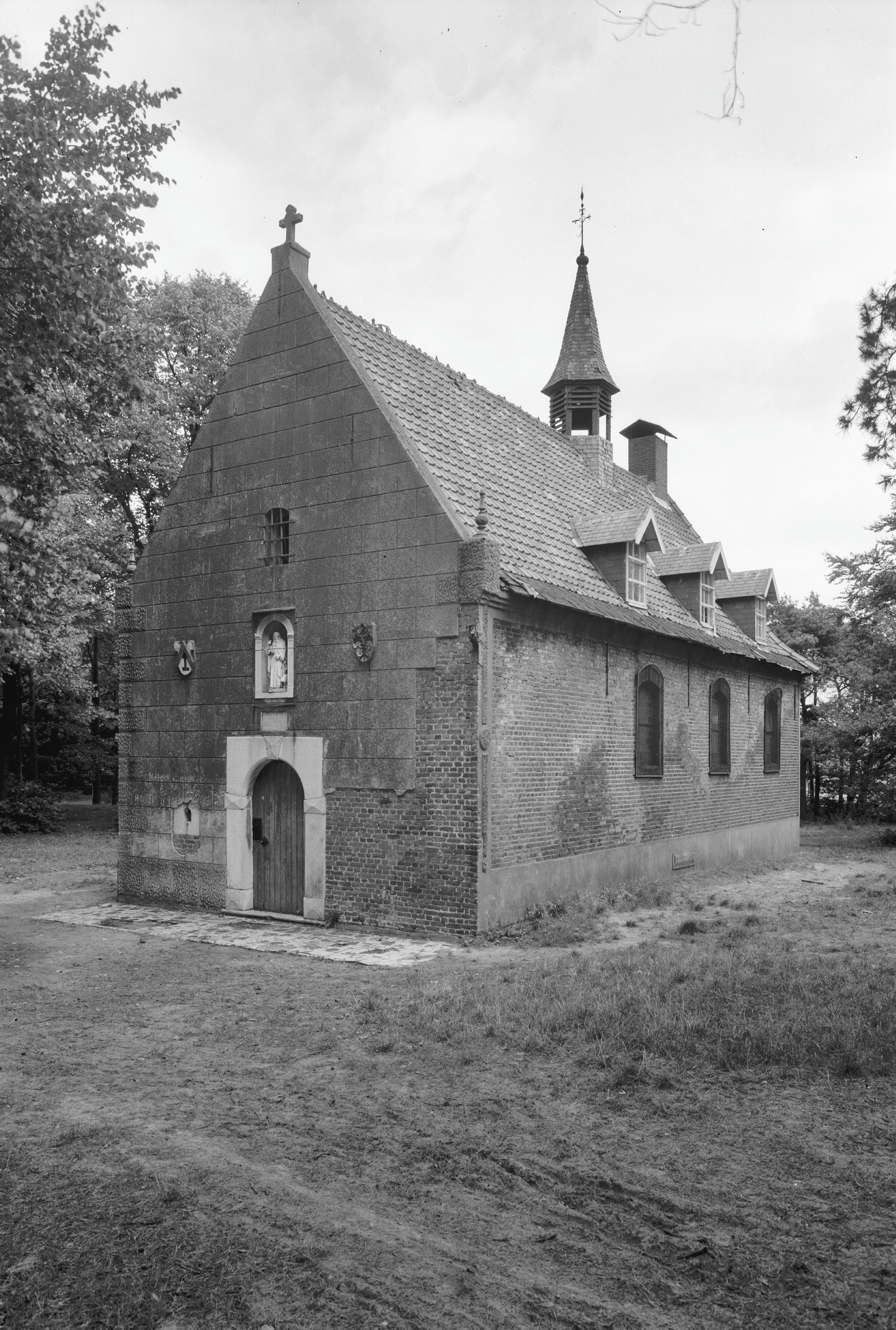 Antoniuskapel: exterieur